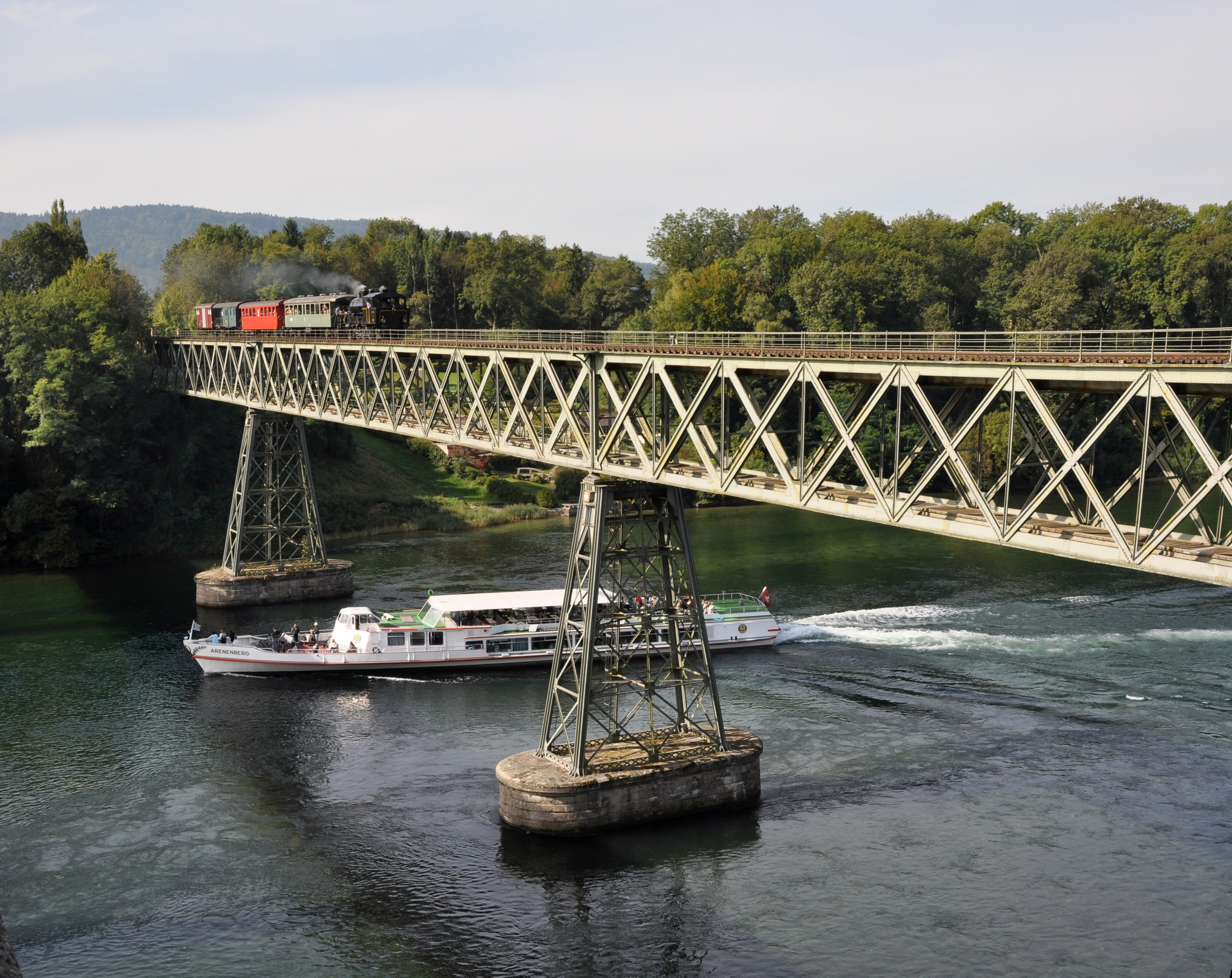 Rheinbrücke der ehem. Nationalbahn, von der Strassenbrück aus. Oben ein Sonderzug der Museumsbahn Stein a. Rhein- Etzwilen- Singen mit der MThB Nr.3, unten das Kursschiff "Arenenberg" Schaffhausen- Stein am Rhein -Konstanz